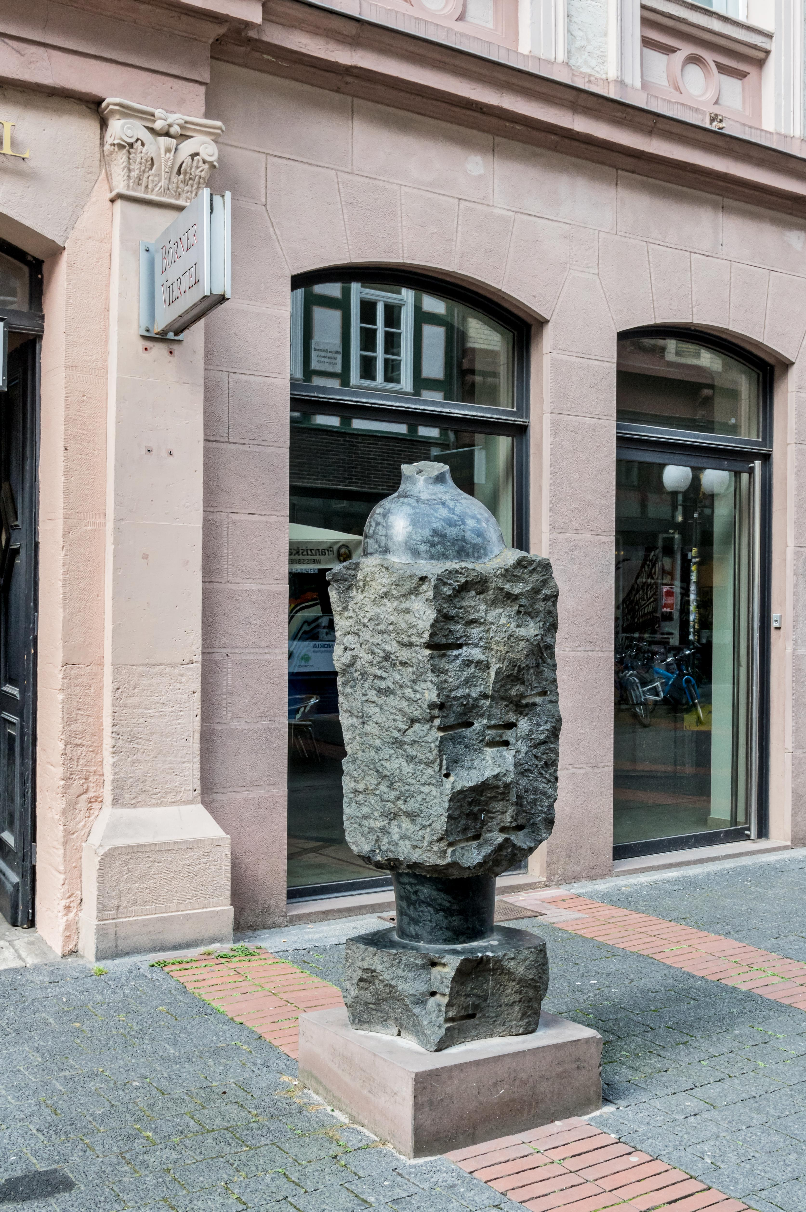 Bilder aus Göttingen Skulpturen am Zugang zum Börner Viertel